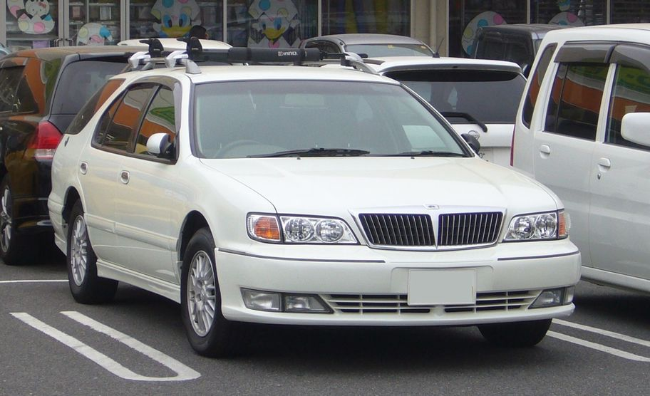 セフィーロワゴン